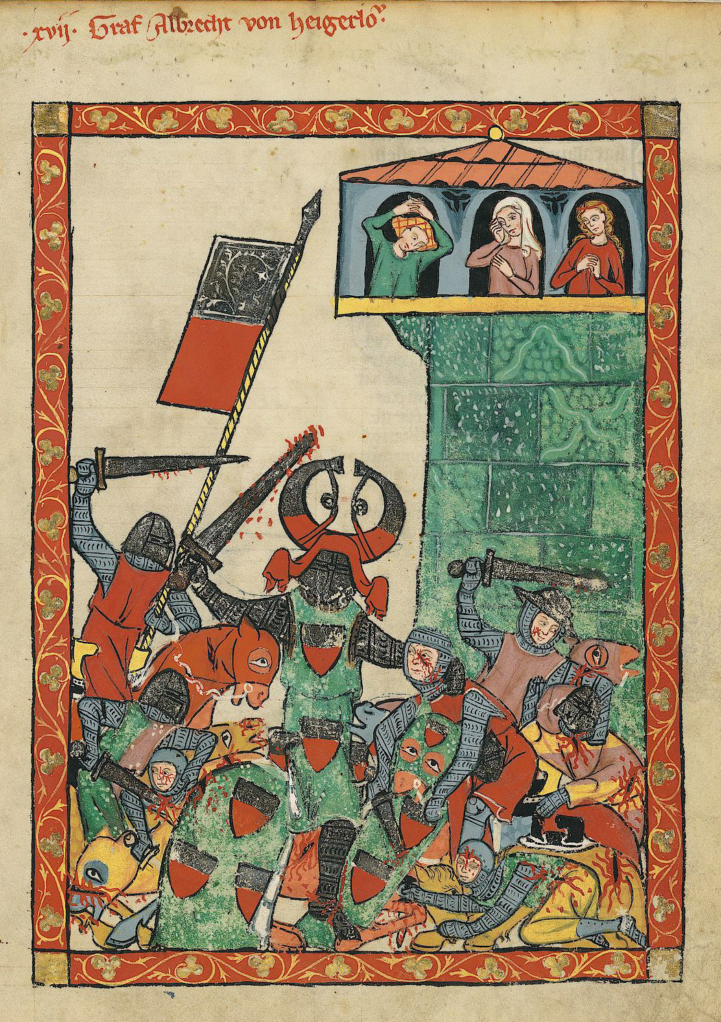 Codex Manesse, UB Heidelberg, Cod. Pal. germ. 848, fol. 42r: Graf Albrecht von Heigerloch